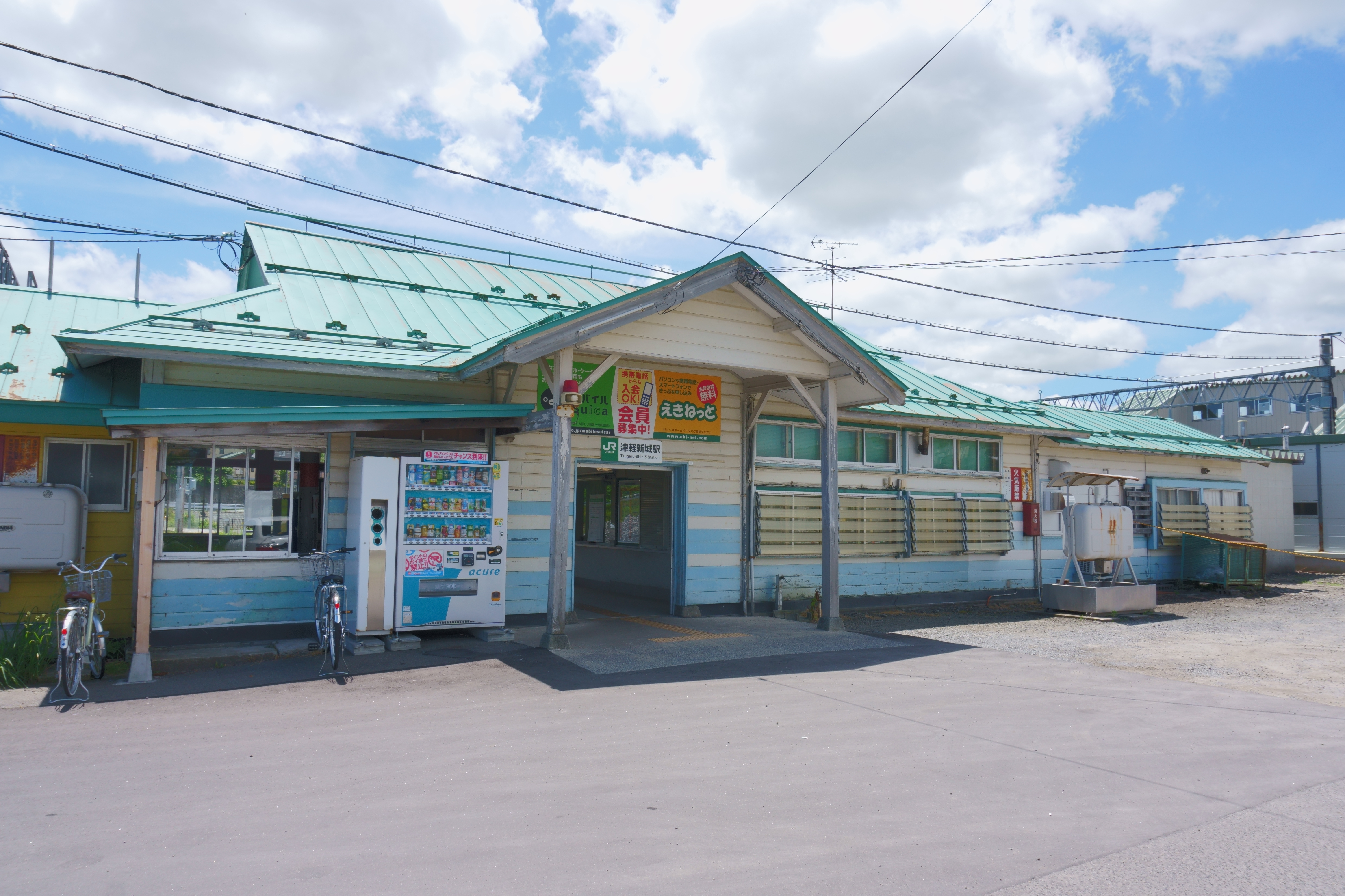 奥羽本線 津軽新城駅（青森県青森市）